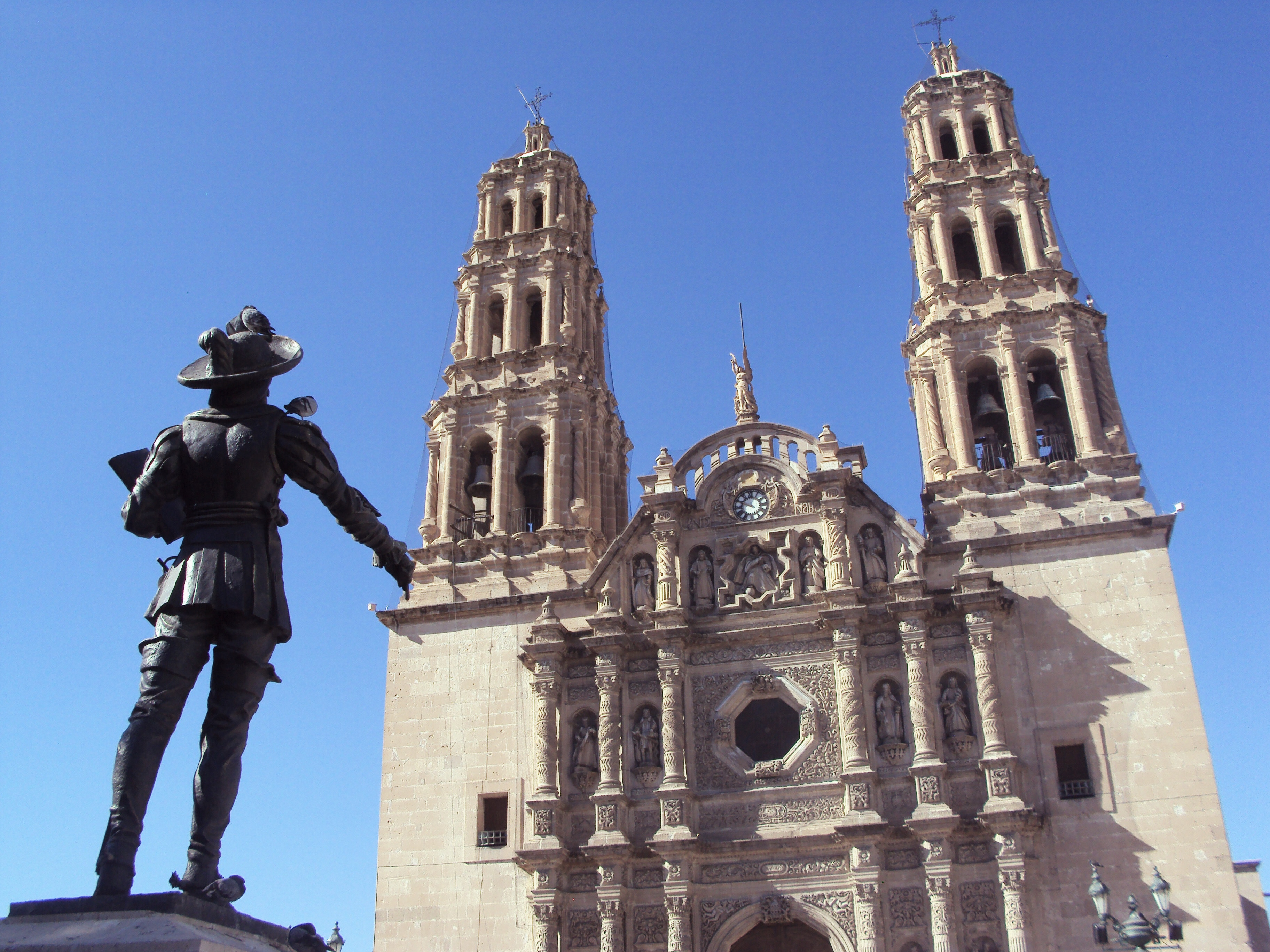 La Catedral de Chihuahua y en primer término la estatua del fundador de la ciudad, Antonio Deza y Ulloa